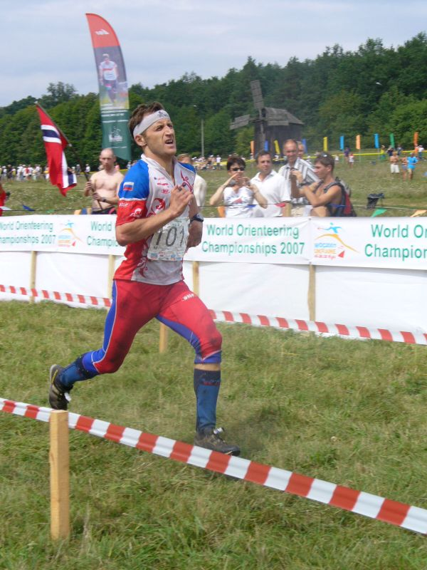 Roman Efimov, WOC2007, Kiev Ukrain